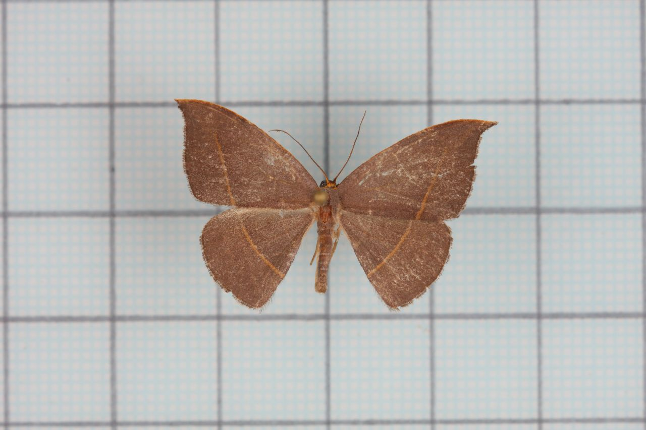 Microblepsis violacea (Butler, 1889) female 灰褐鉤蛾 鞍2:P.31,Pl.:38-1 Microblepsis violoacea (Bulter 1889) 灰褐鉤蛾 TaiBNET